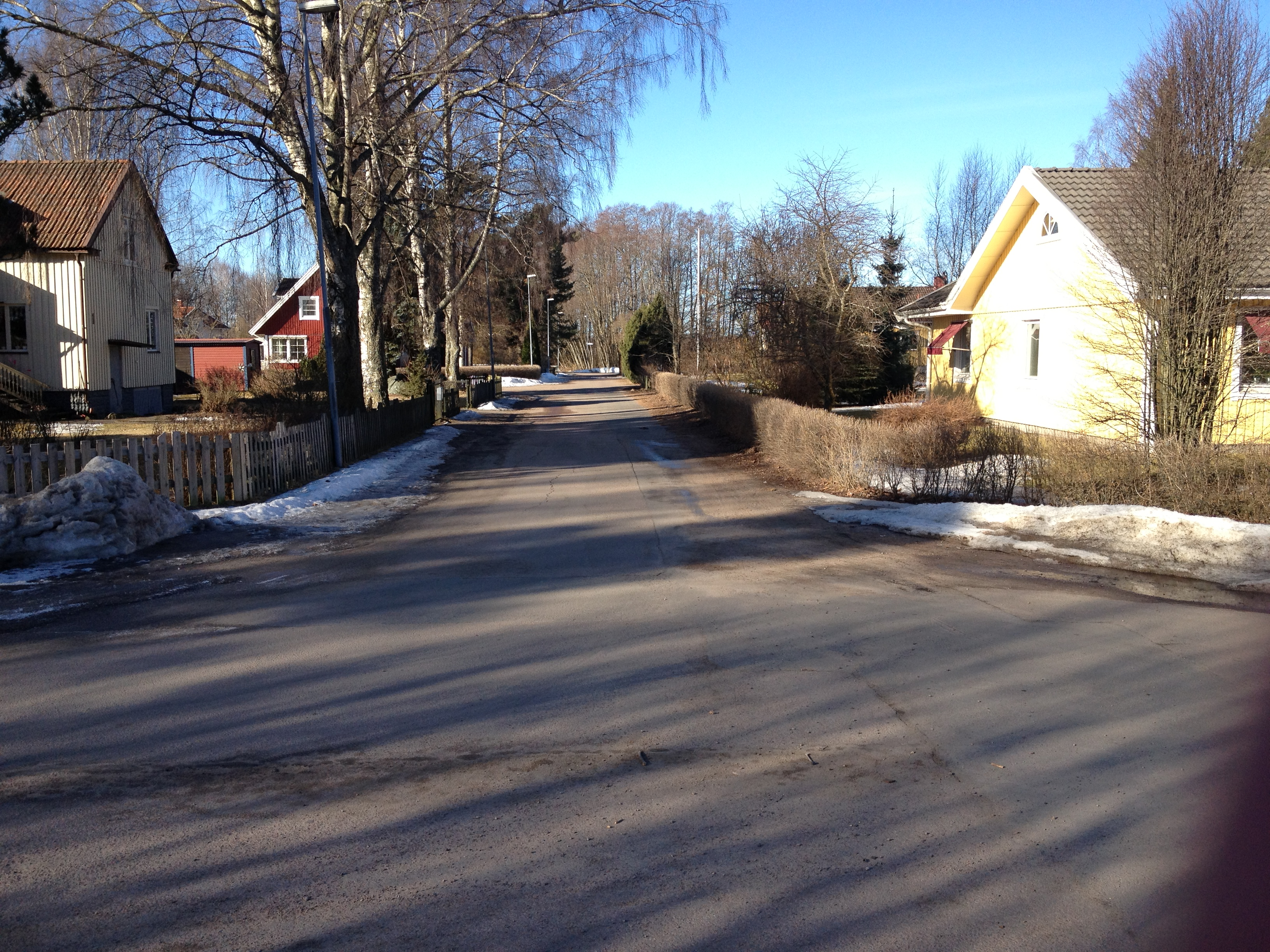 Bostadsområde i Hammarö Kommun